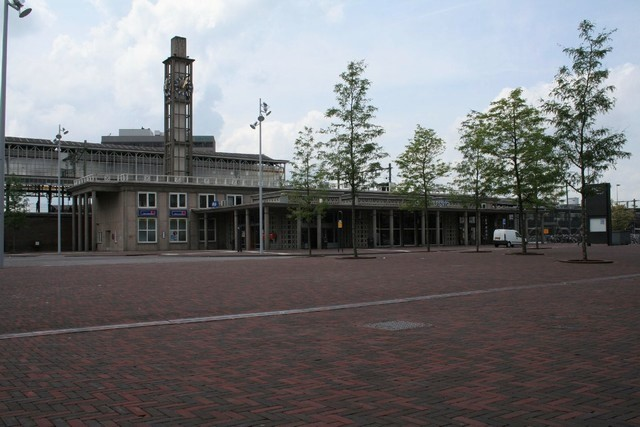 Station Hengelo vanaf de straatzijde